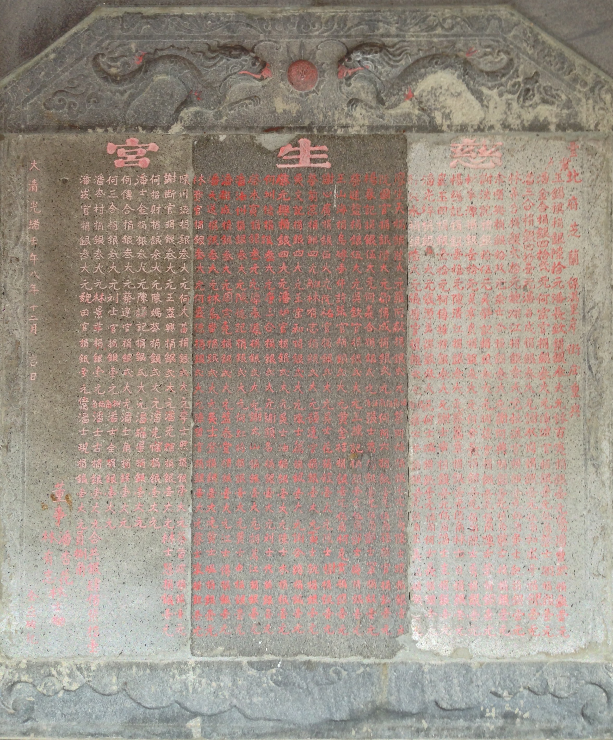 中文（台灣）: 慈生宮石碑